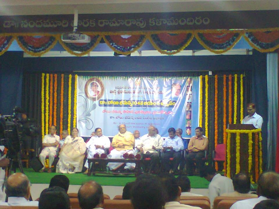 బోయి భీమన్న పురస్కారాలు